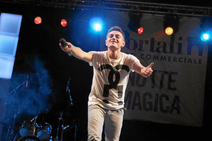 Virginio Simonelli durante un live